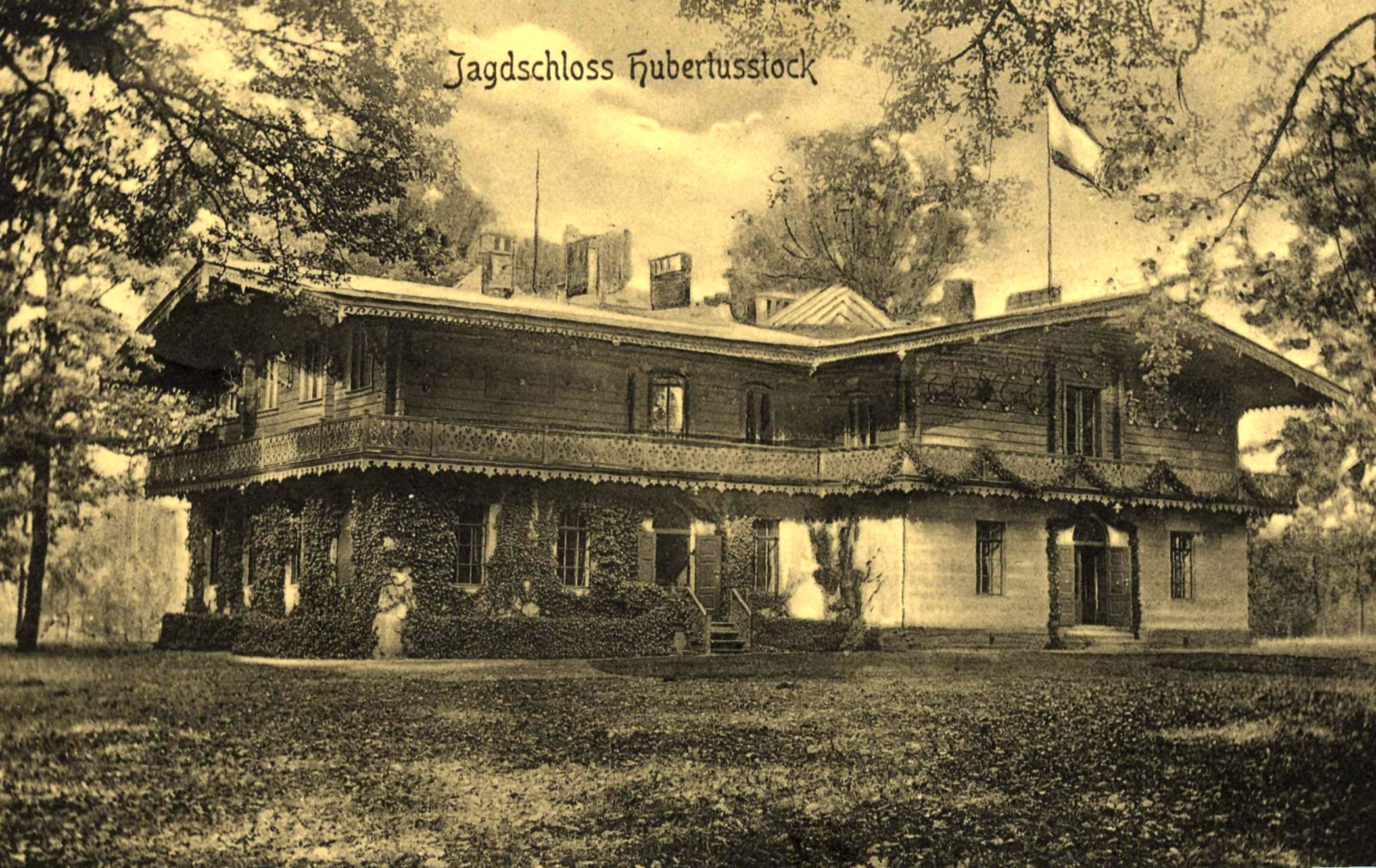 Jagdschloss Hubertusstock auf einer Ansichtskarte von 1913